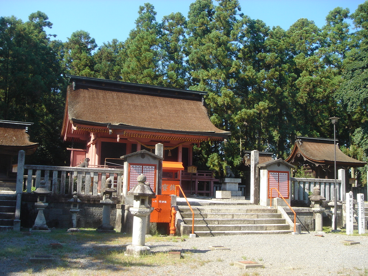 Hiyoshi Jinjya(Shrine)(日吉神社),Godo,Gifu,Japan(岐阜県神戸町)で撮影